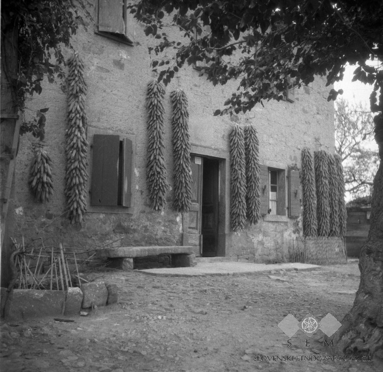 Frmenton (koruza) v "reštah", Škofije.